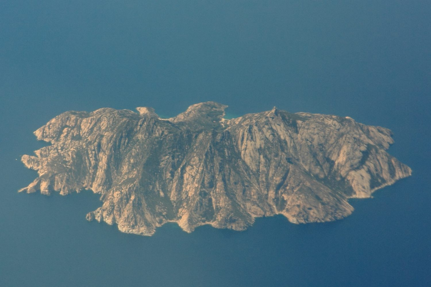 Vue aérienne de l'ïle de Montecristo dans l'archipel toscan en Italie